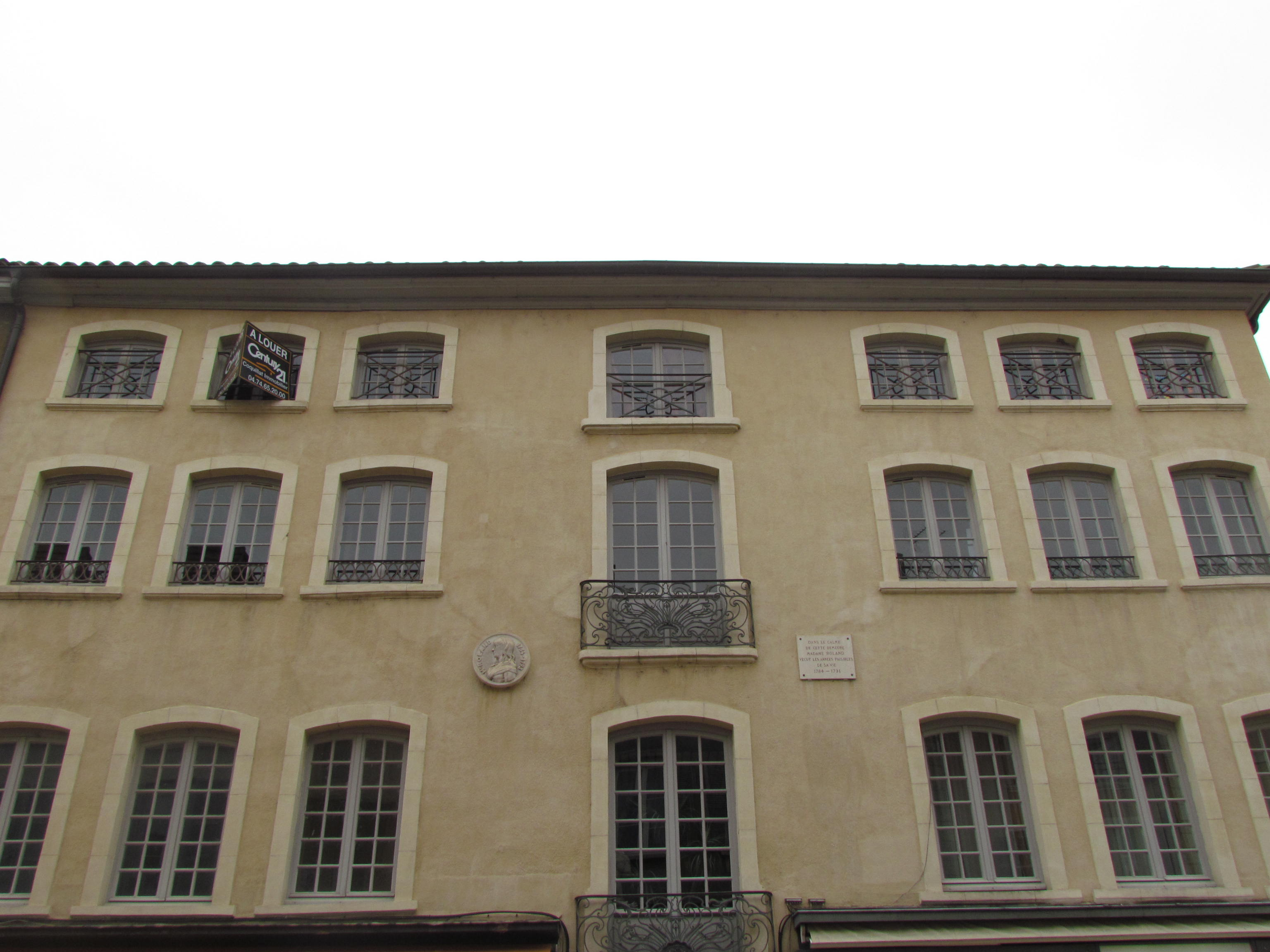 immeuble 793 rue Nationale .